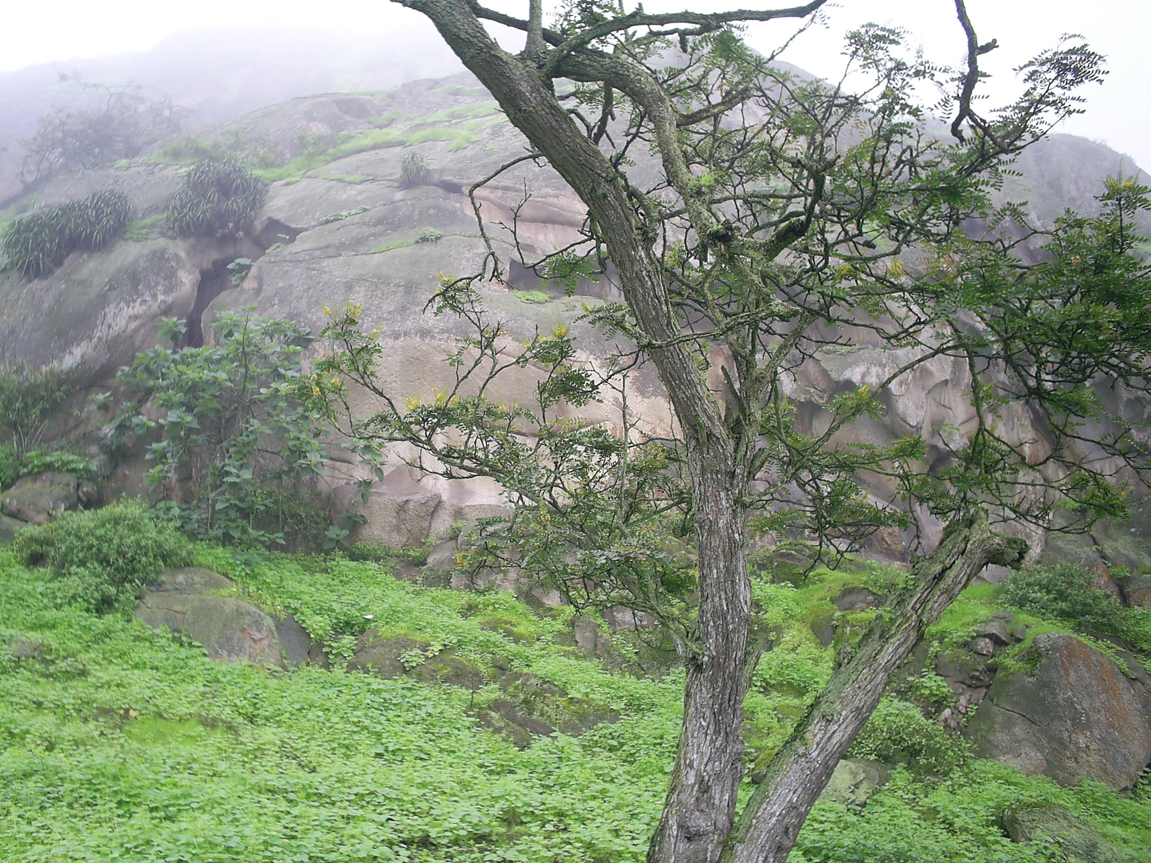 Vegetation in Lomas de LachayLachay Lumakunapi yurakuna